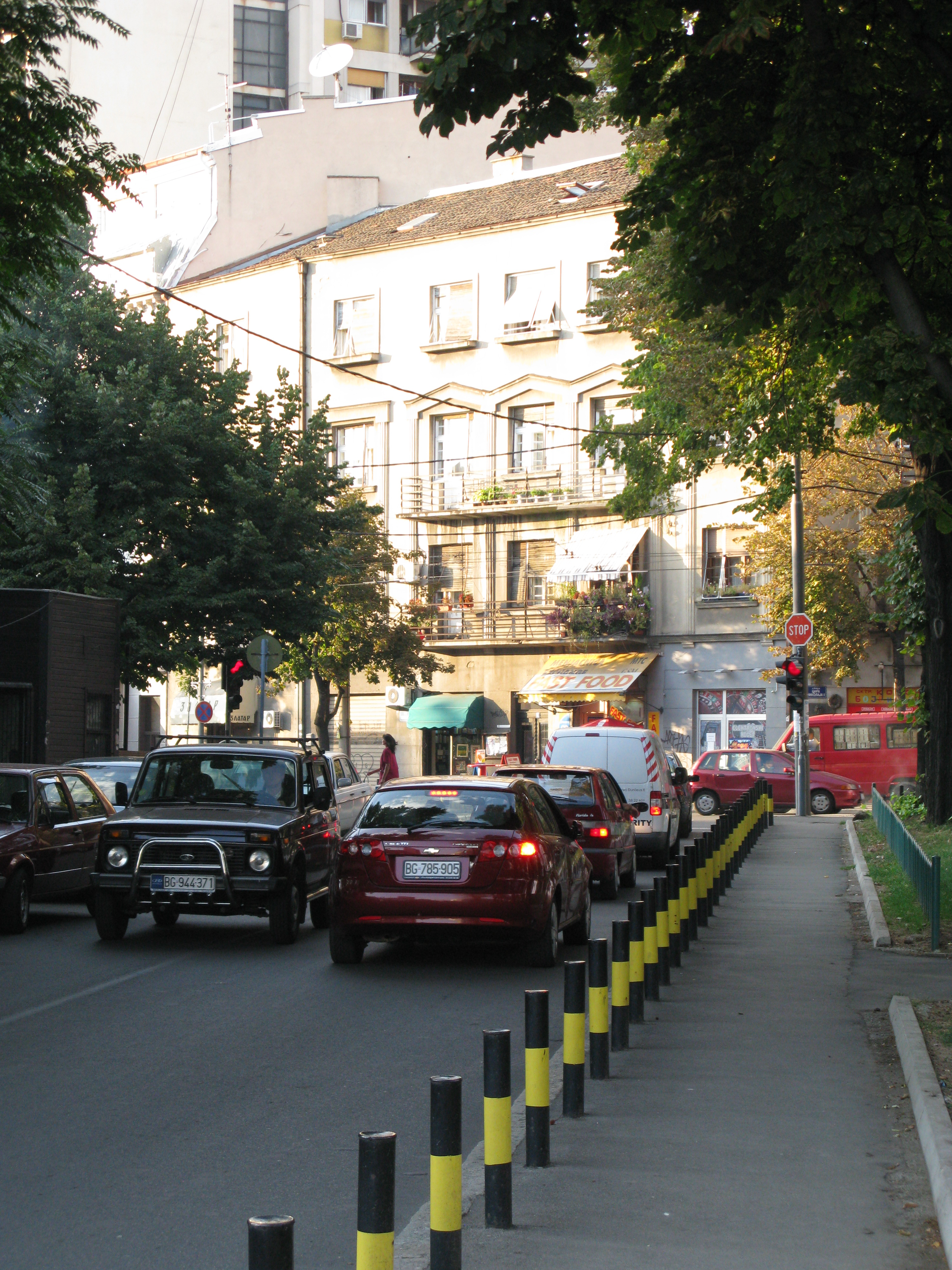 A street in Čubura, Belgrade